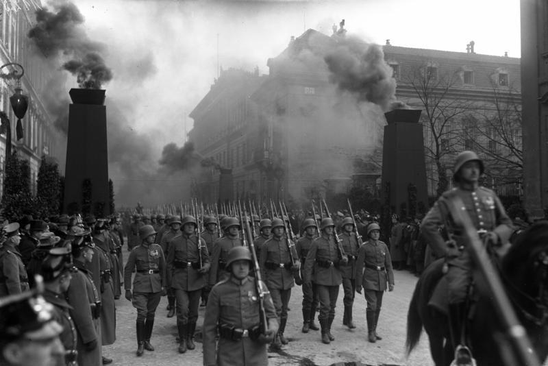 Des Reichspräsidenten letzte Fahrt! Die Trauerparade der Reichwehr vor dem Reichspräsidenten-Palais in der Wilhelmstraße. Im Hintergrund die brennenden Obelisken. Information added by Wikimedia users.